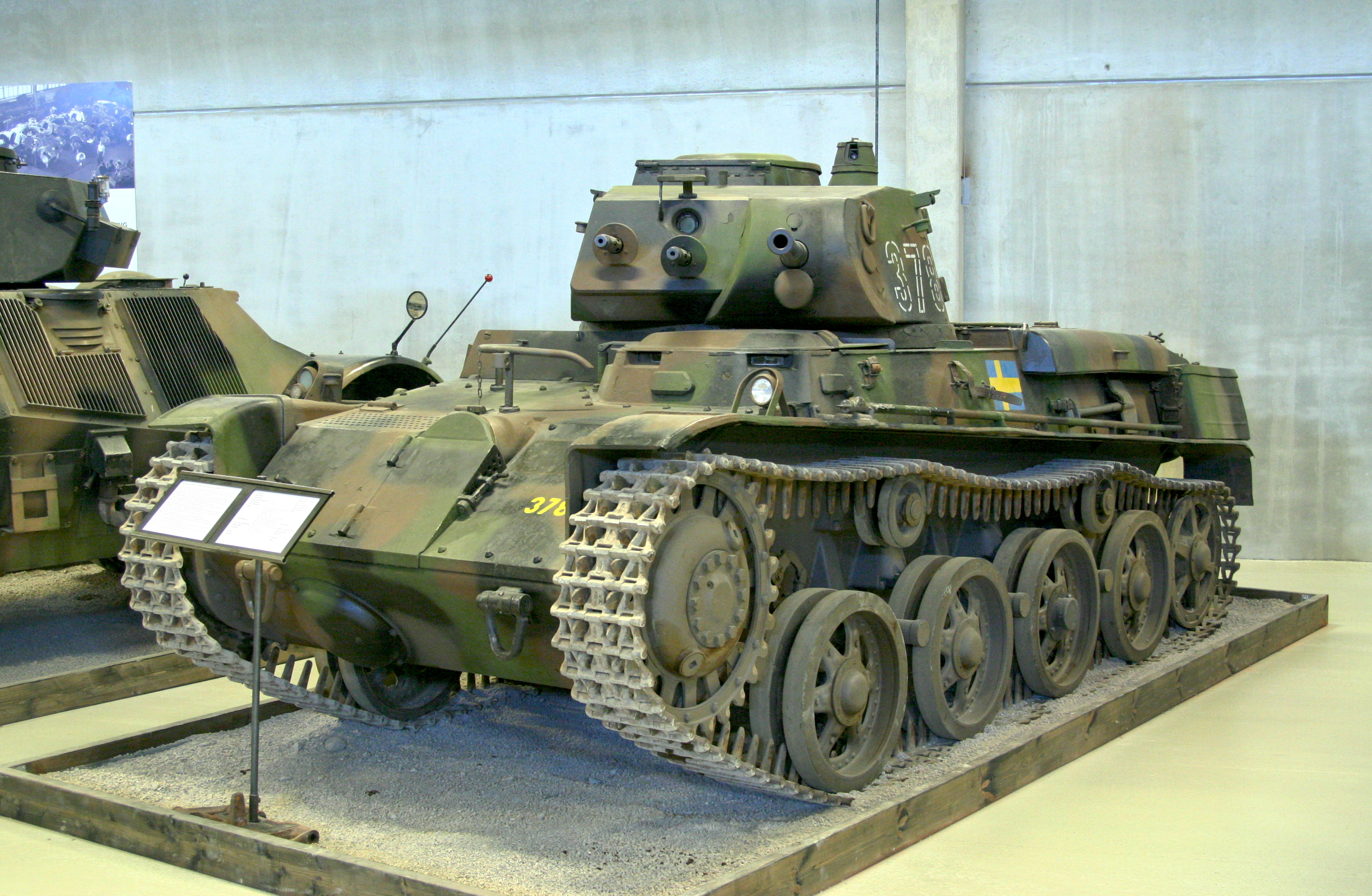 Stridsvagn m/40L i Arsenalen Strängnäs 12.08.2011